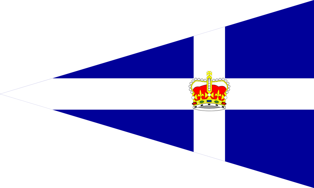 Pavillon du Royal Thames Yacht Club en miroir